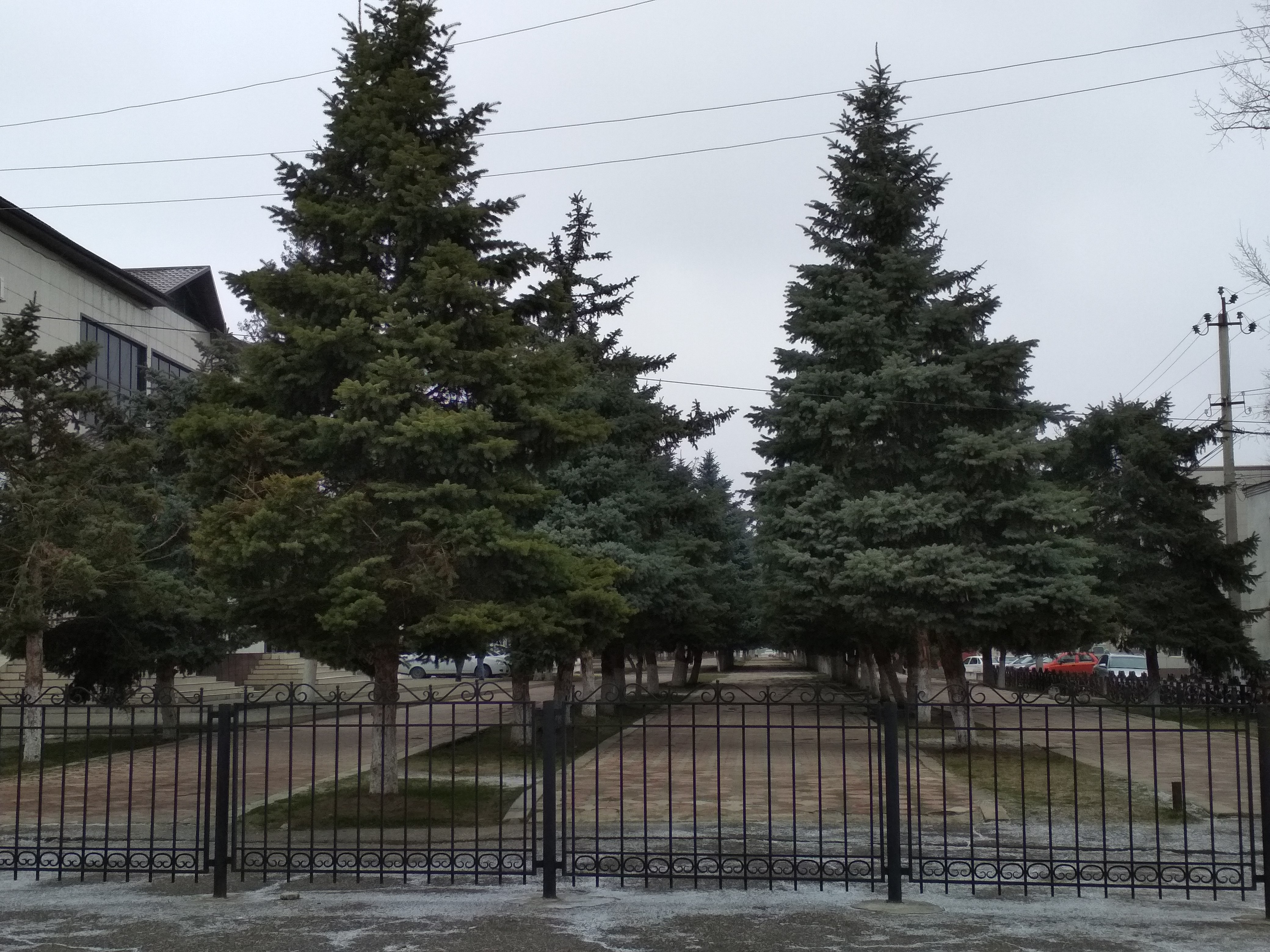 Нохчийн: Аллея в Науре